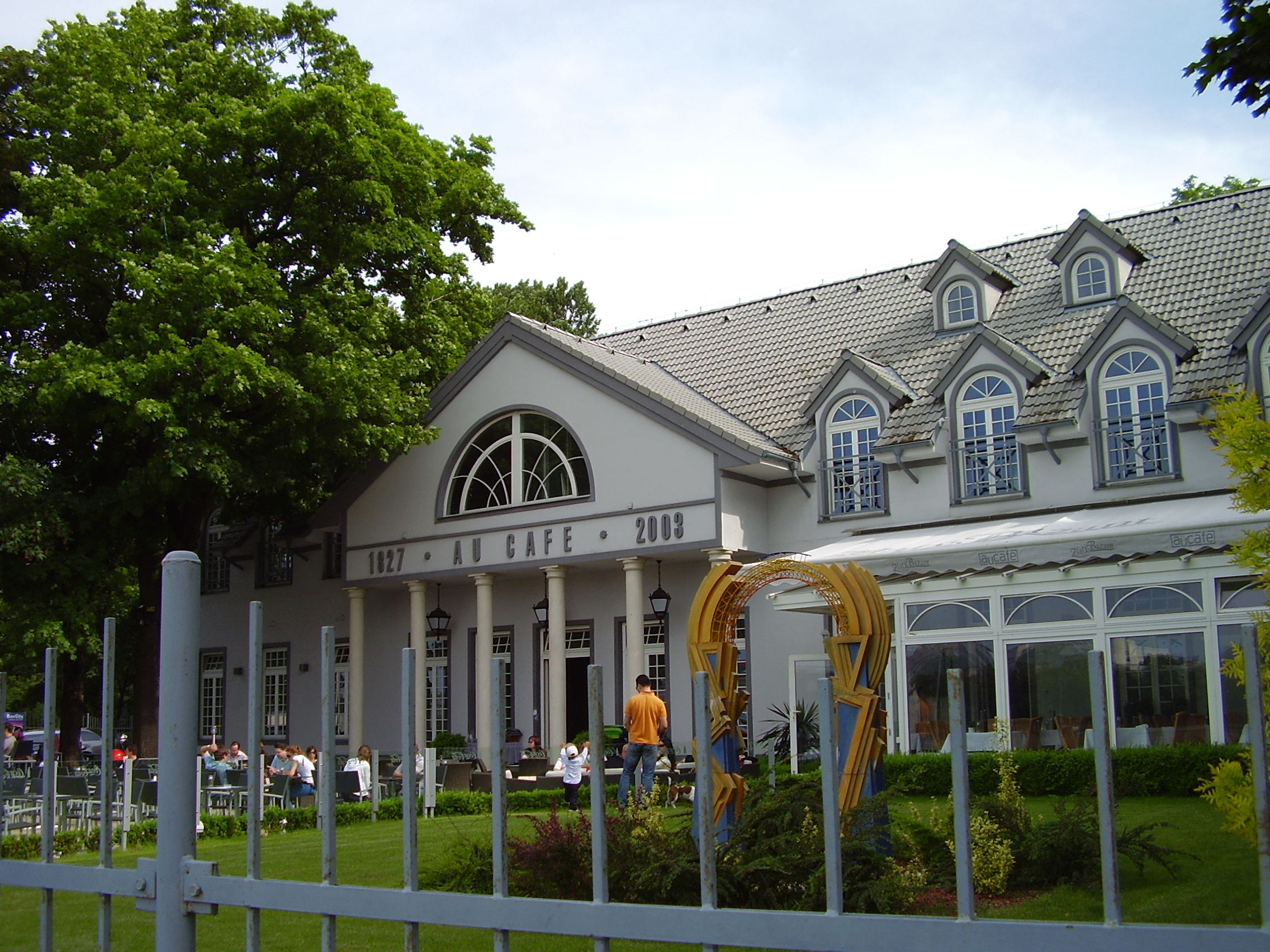 Au café restaurant, Viedenská cesta, Petržalka